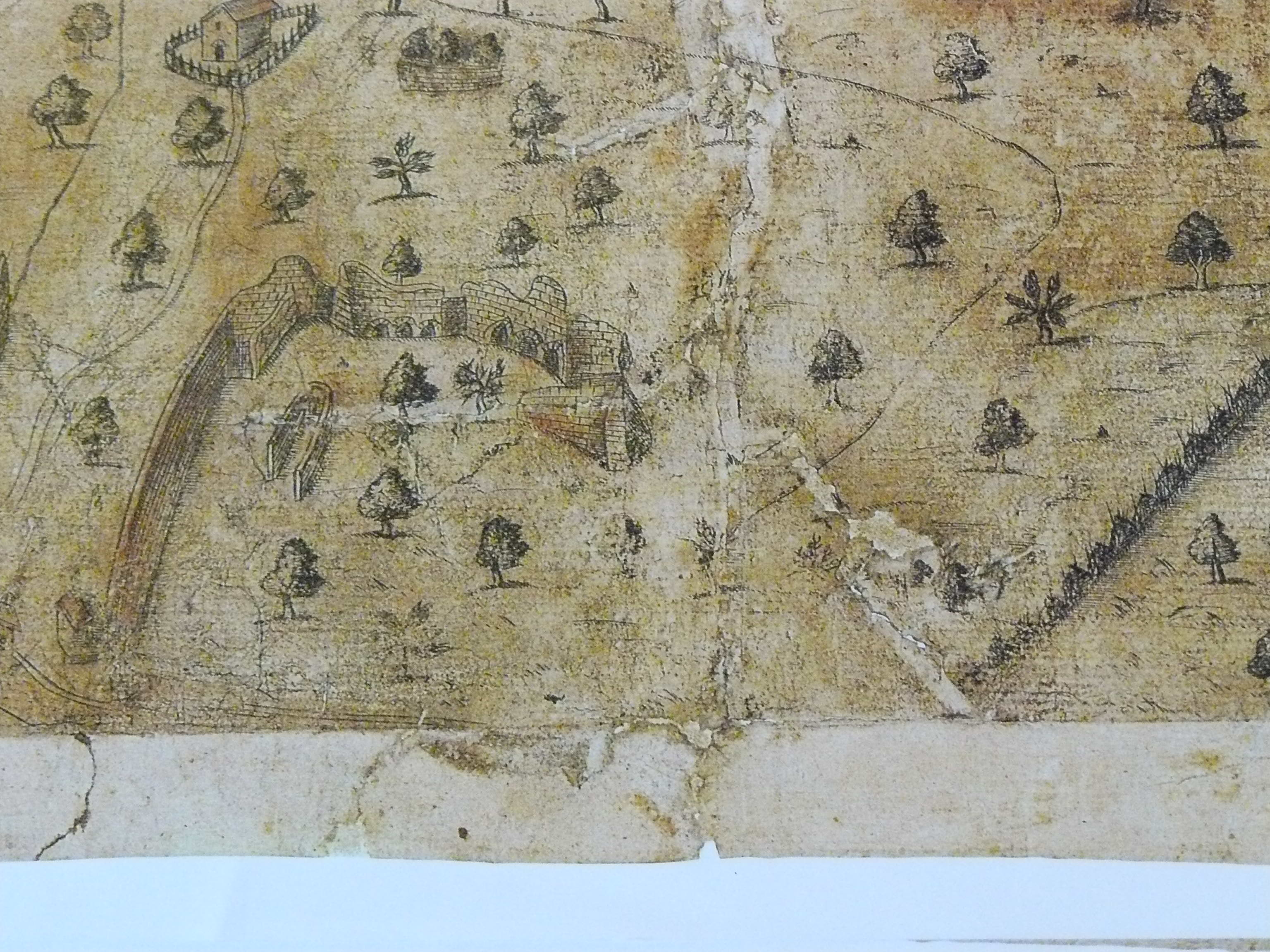 Détail des ruines de l'Odéon antique et du théâtre romain de Fourvière sur le plan scénographique de Lyon de 1550.